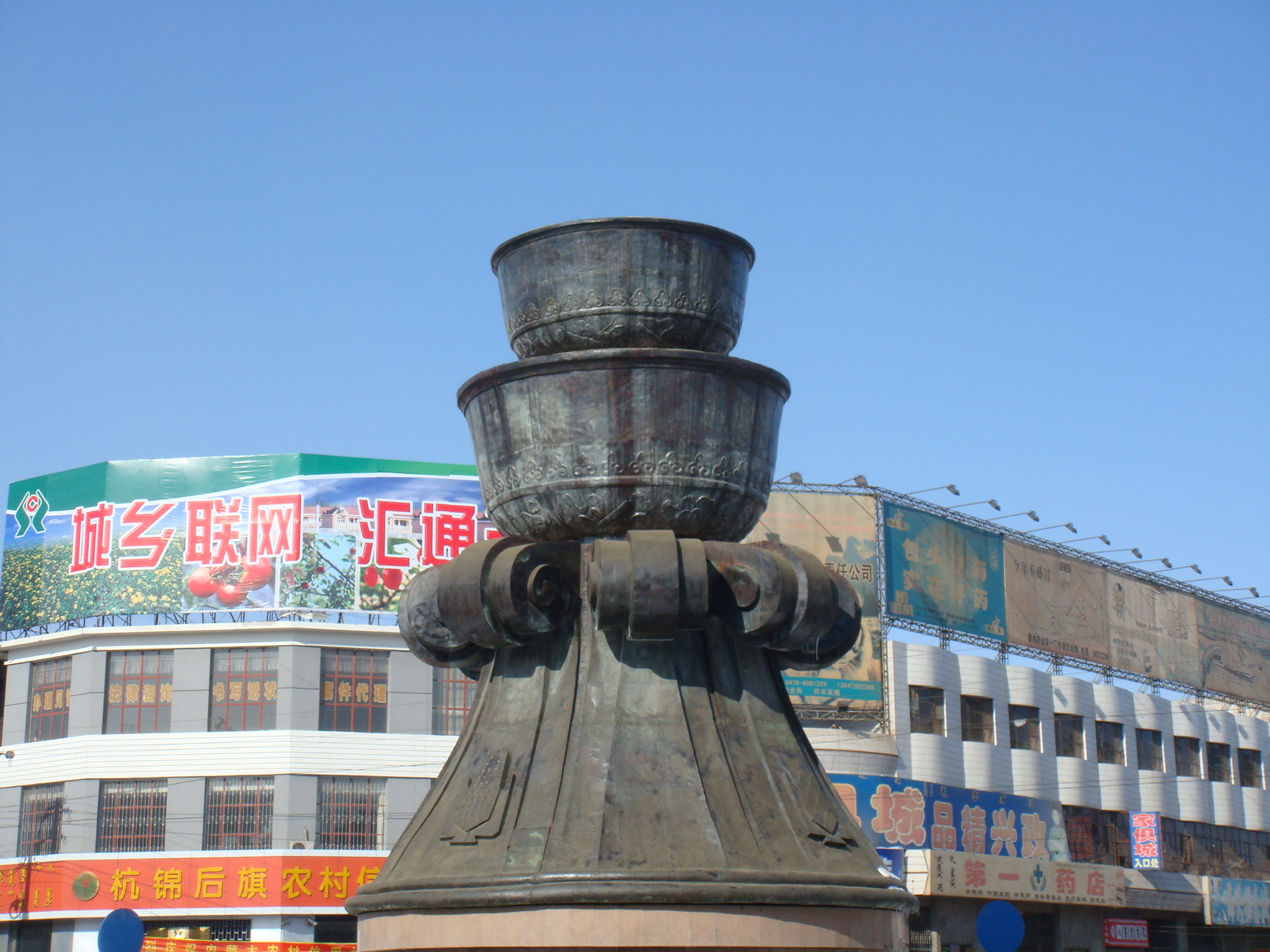 陕坝大转盘